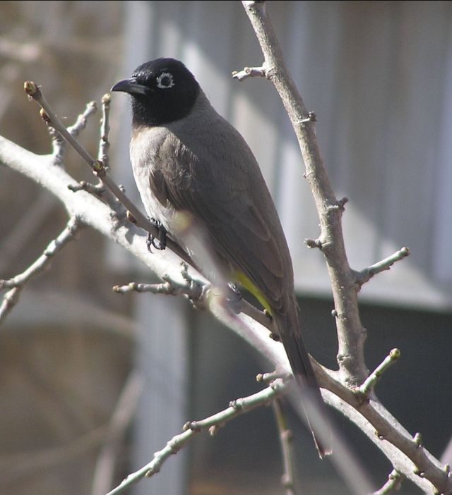 Pycnonotus xanthopygos, taken in Jerusalem, Israel